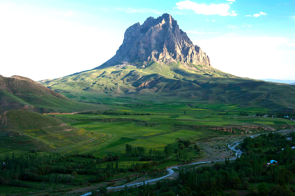 İlanlı dağ